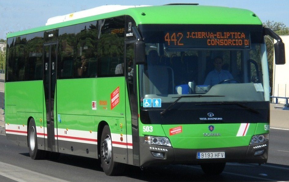 Nuevo autobus de Tata Hispano del modelo Intea